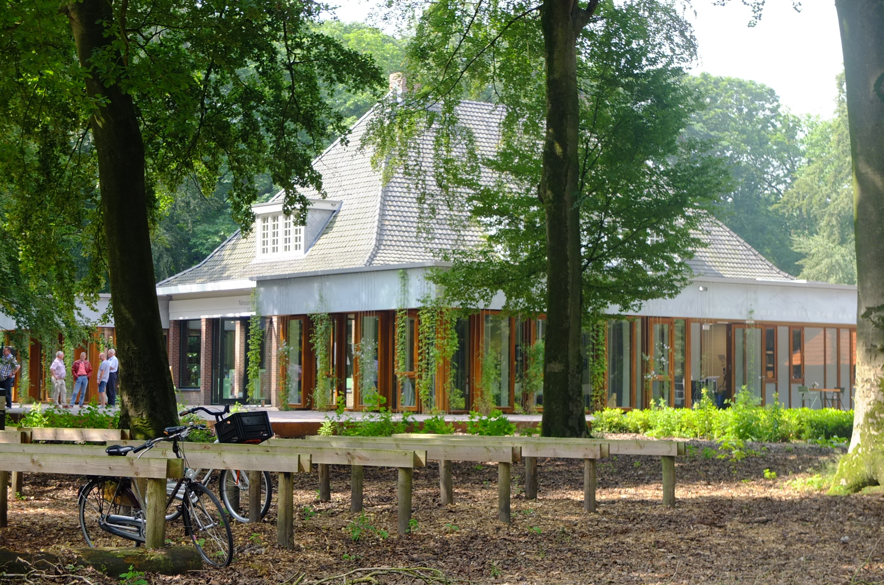 Zicht op een deel van het bezoekerscentrum Groot Speijck van Natuurmonumenten gelegen nabij Oisterwijk